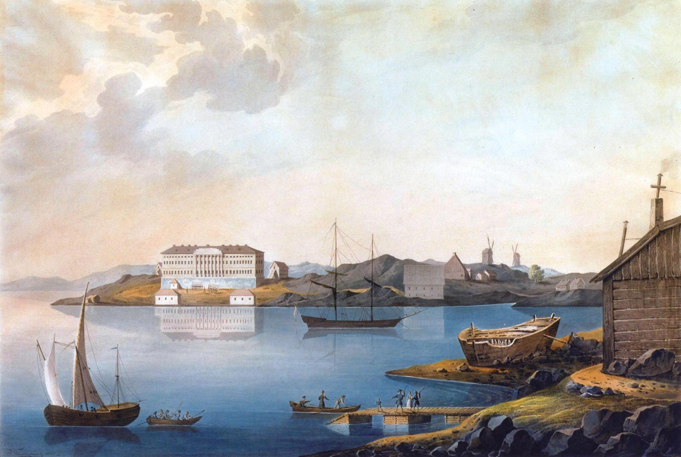 Valerian Galjaminin maalaus Helsingin Katajanokan Merikasarmista Pohjoisrannasta nähtynä. Teoksen omistaa Helsingin kaupunginmuseo.